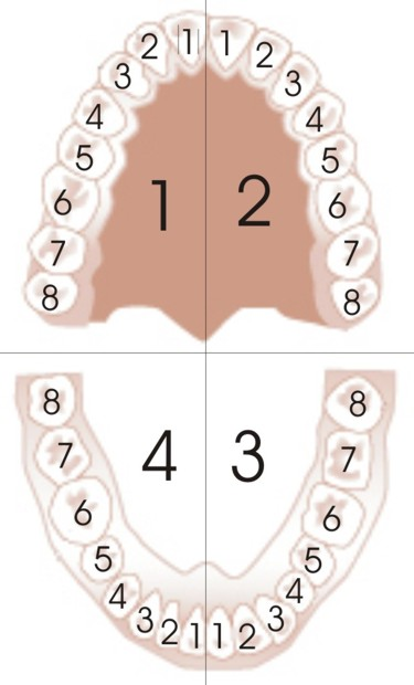 Распоред људских зуба